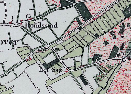 Deel van Topografische militaire kaart, 1899 Bonneblad, Alphen